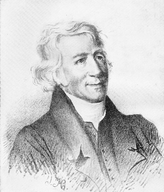 Frédéric-César de la Harpe. Lithographie